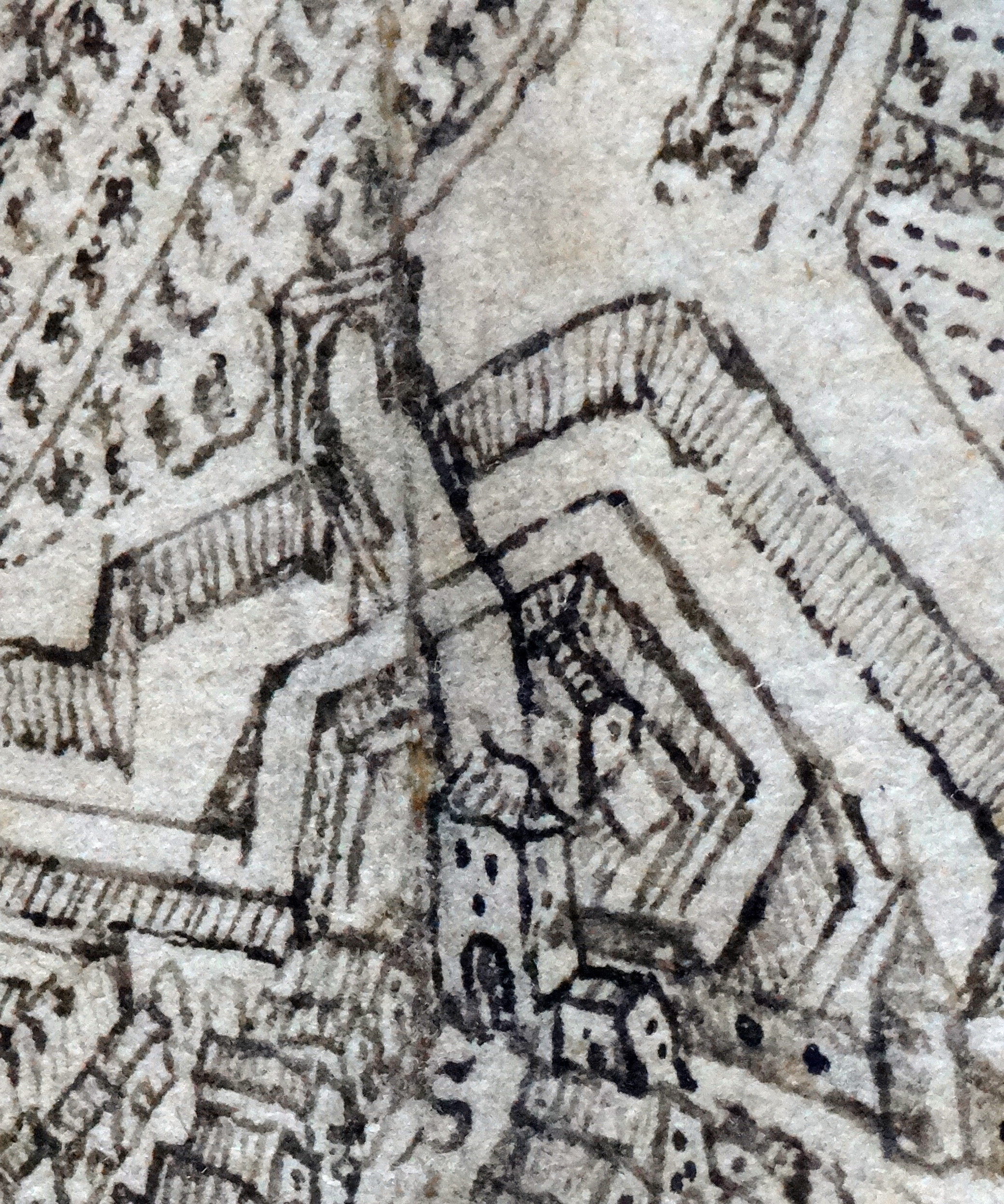 Äußeres Andreastor der Stadtbefestigung Worms. Detail aus: Peter Hamman: Statt Wormbß wie selbige 1631 vor dem Schwedischen Ruin der Vorstätt [...] verblieben. Stadtarchiv Worms, Abt. 1B, Nr. 48.